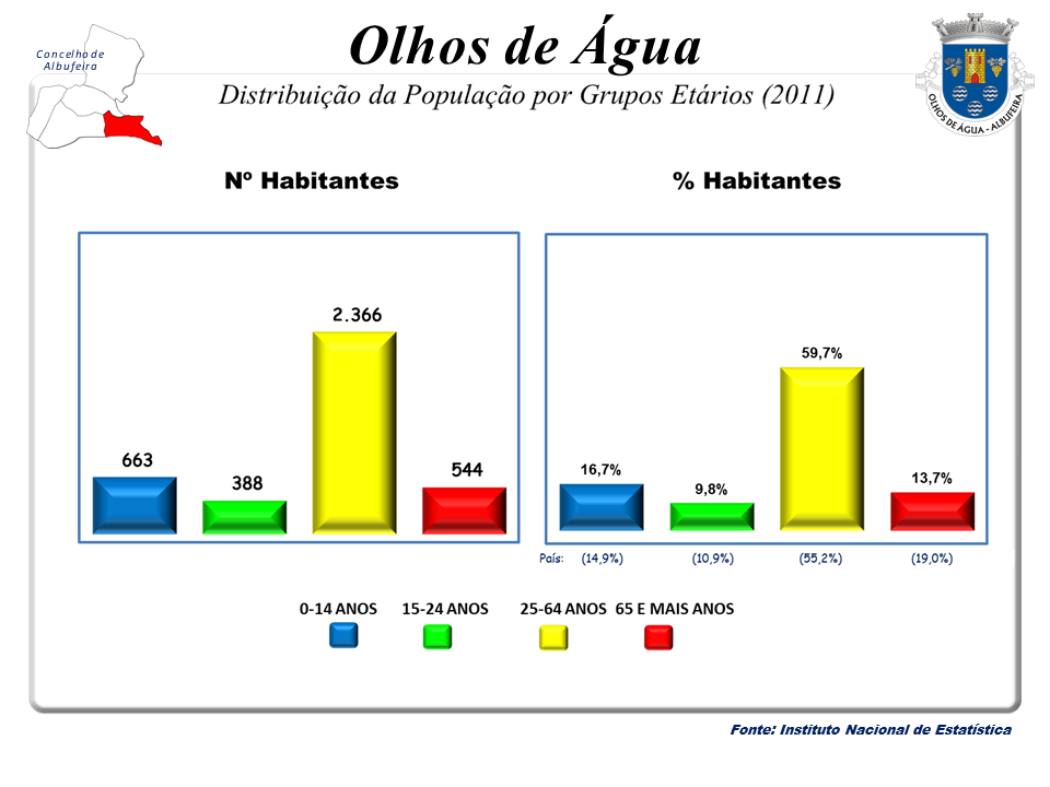 Censos 1864/2011